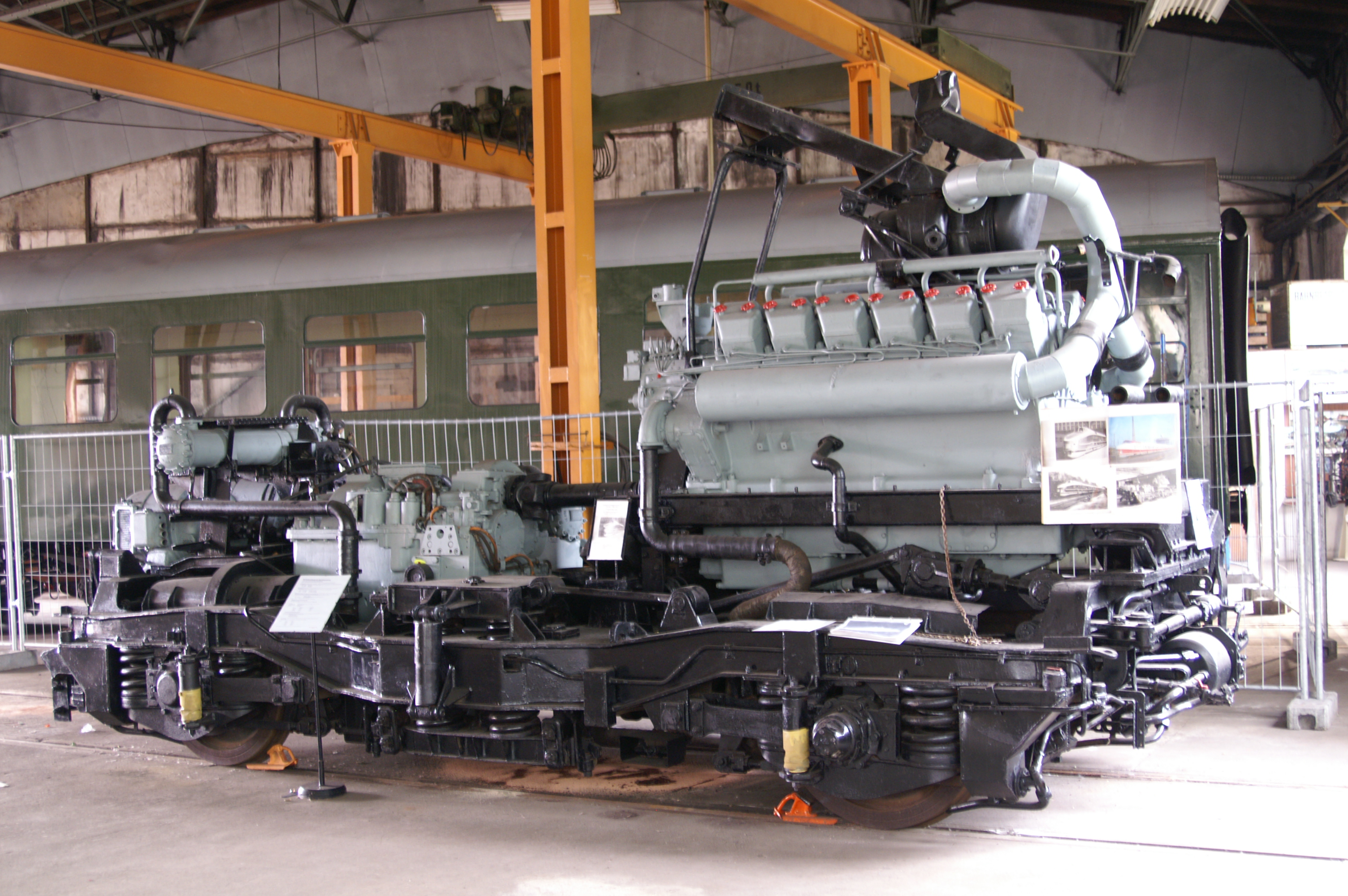 Triebdrehgestell eines DR-SVT im SEM Chemnitz-Hilbersdorf